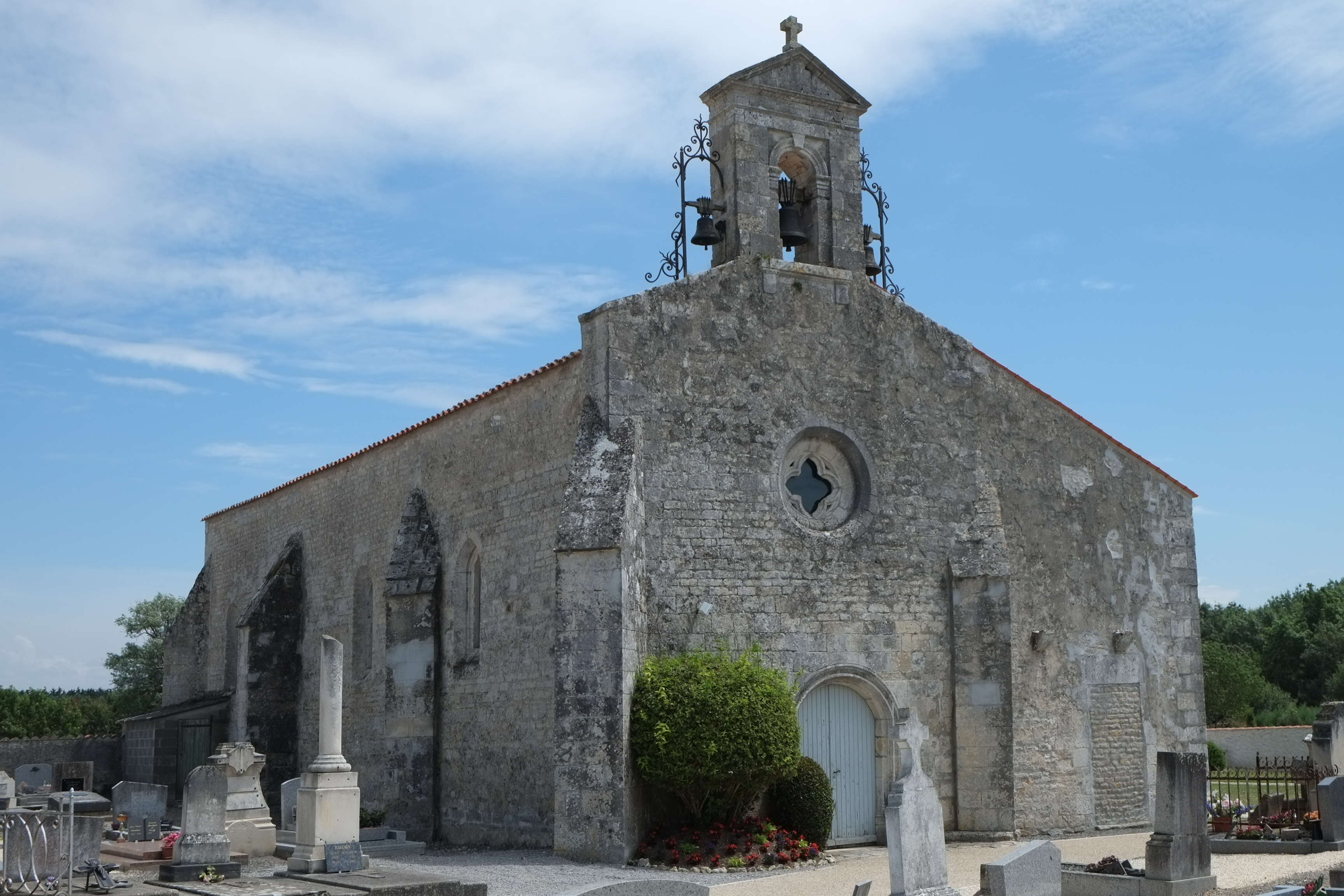 Église Saint-Vivien Charente-Maritime France